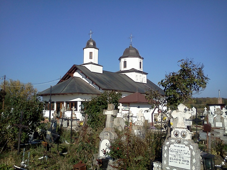 Biserica de lemn „Sf. Arhangheli Mihail și Gavriil”